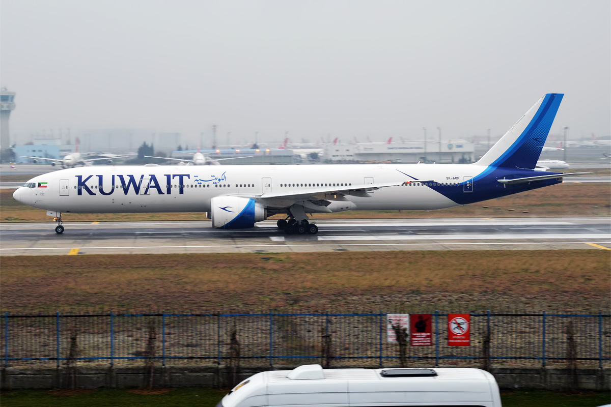 Kuwait Airways, 9K-AOK, Boeing 777-369 ER